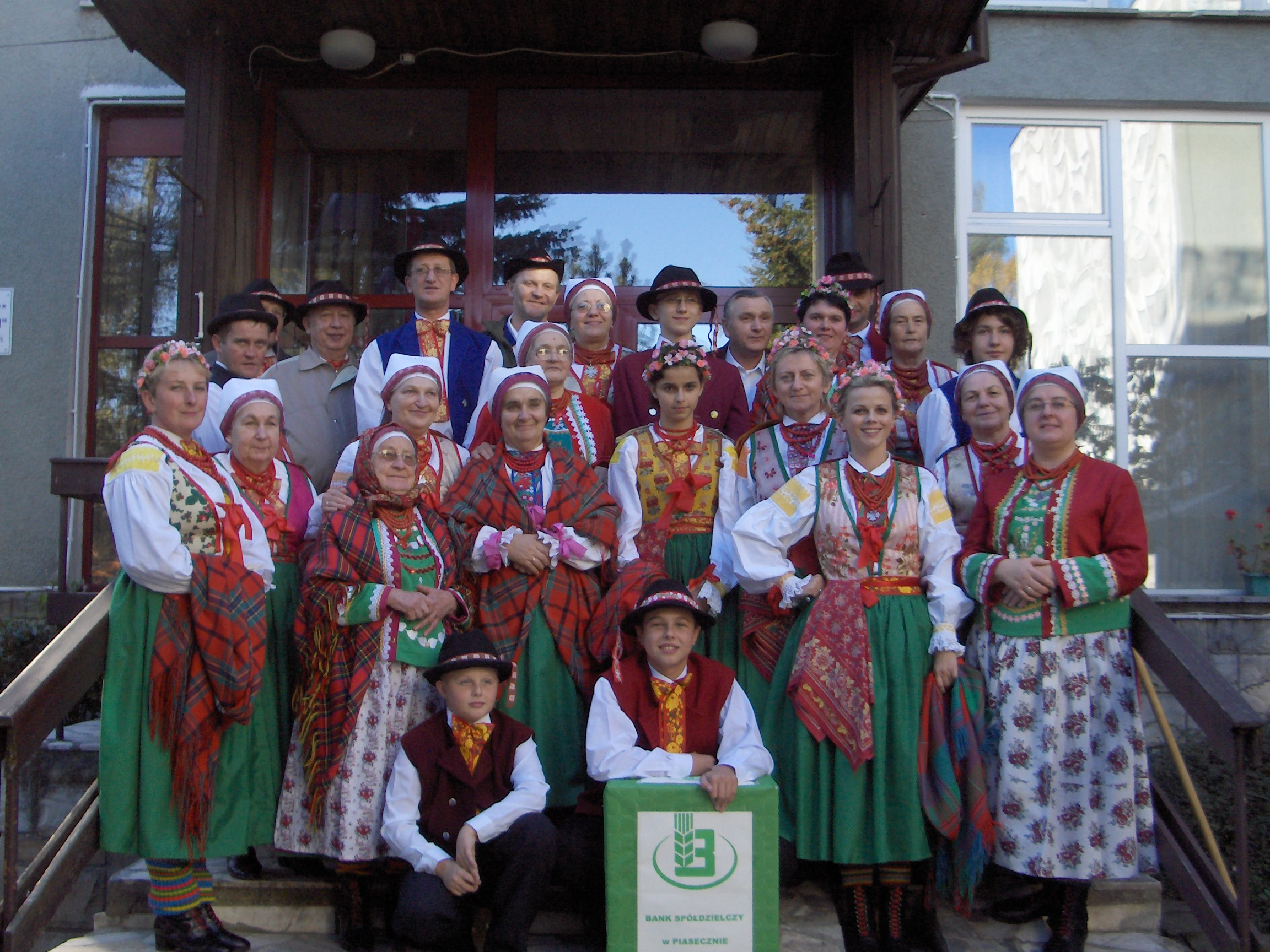 Ślůnski: Regionalny Zespół Pieśni i Tańca "Wilamowice".